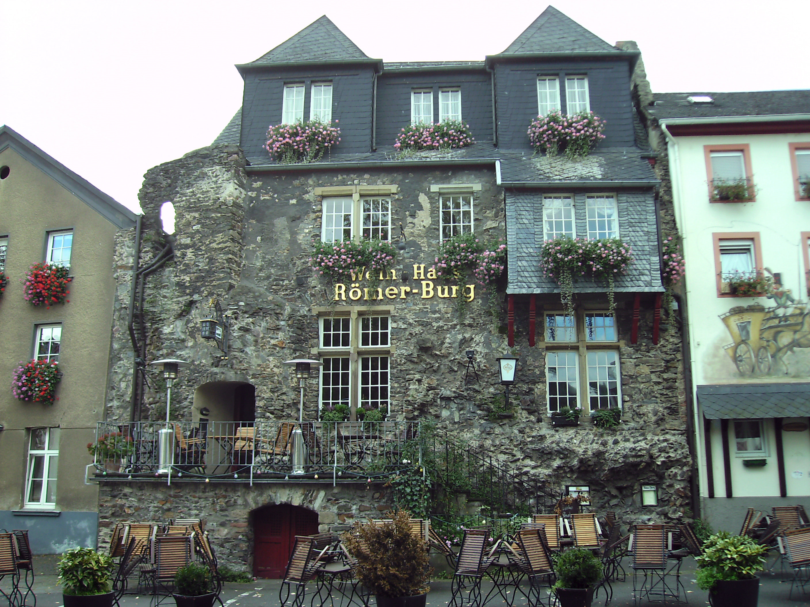 Boppard: Altstadthaus mit gebietstypischer Bauweise (Naturschiefer)